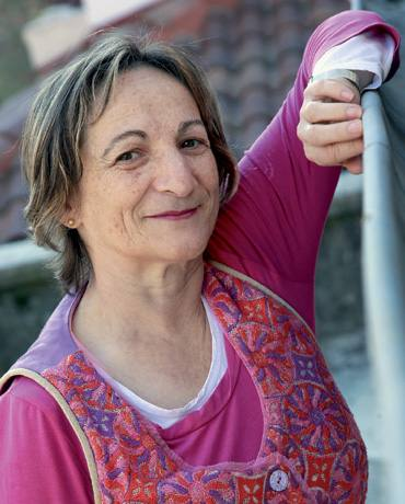 Sagrario Aleman euskara irakasle eta euskaltzaina, 2011. urtean